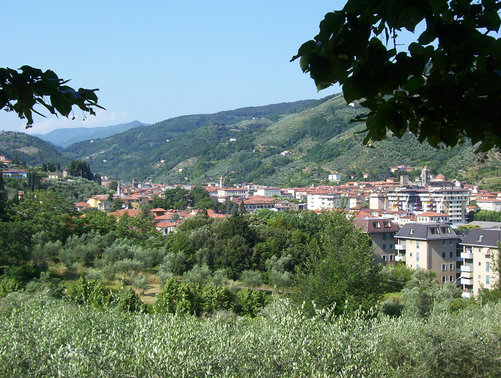 Photo taken by me (Bukkia)